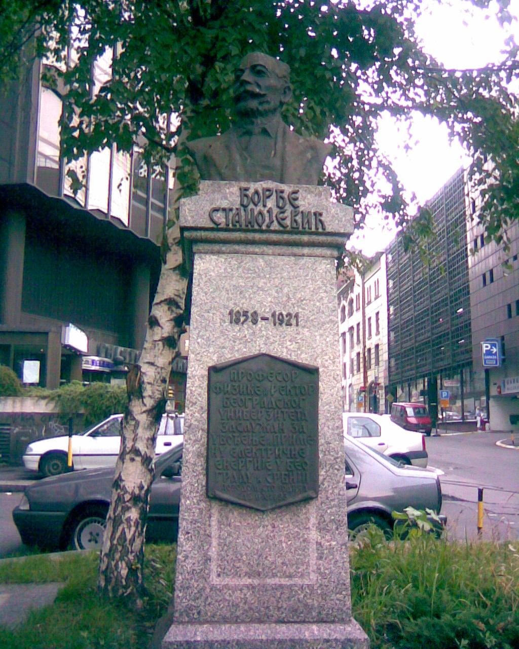 Статуа Ђорђа Станојевића испред Елетродистрибуције Београд у Масариковој улици. Сликано 11.08.2007. Сликао и приложио аутор.